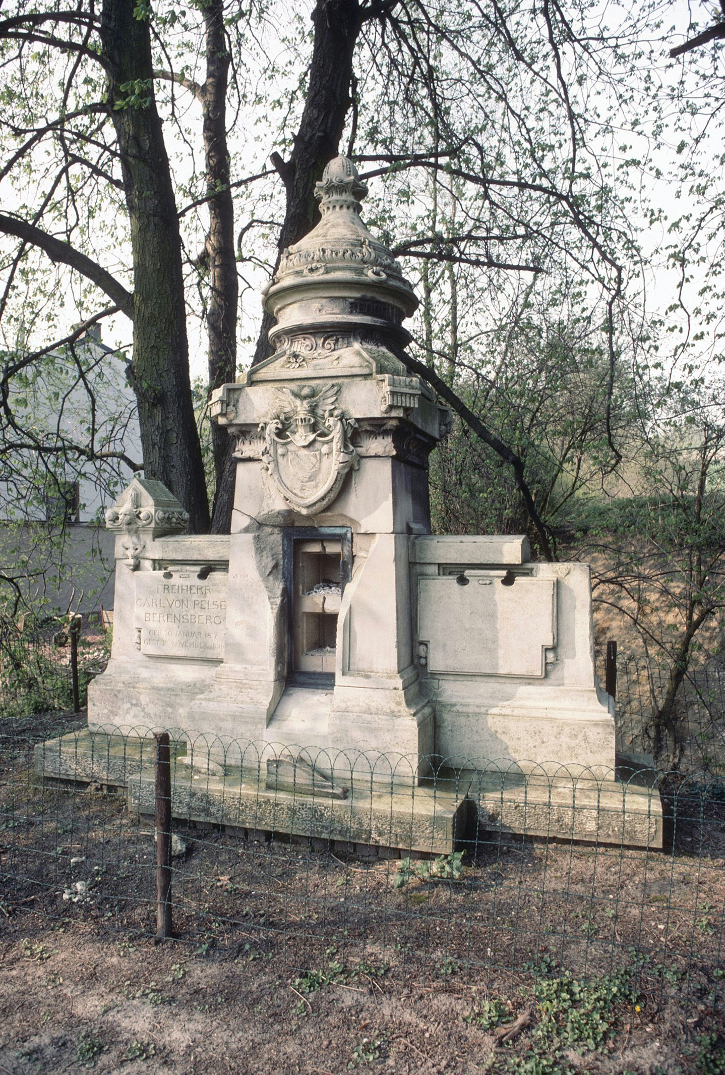 Kasteel: Exterieur MONUMENTALE BANK IN HET PARK